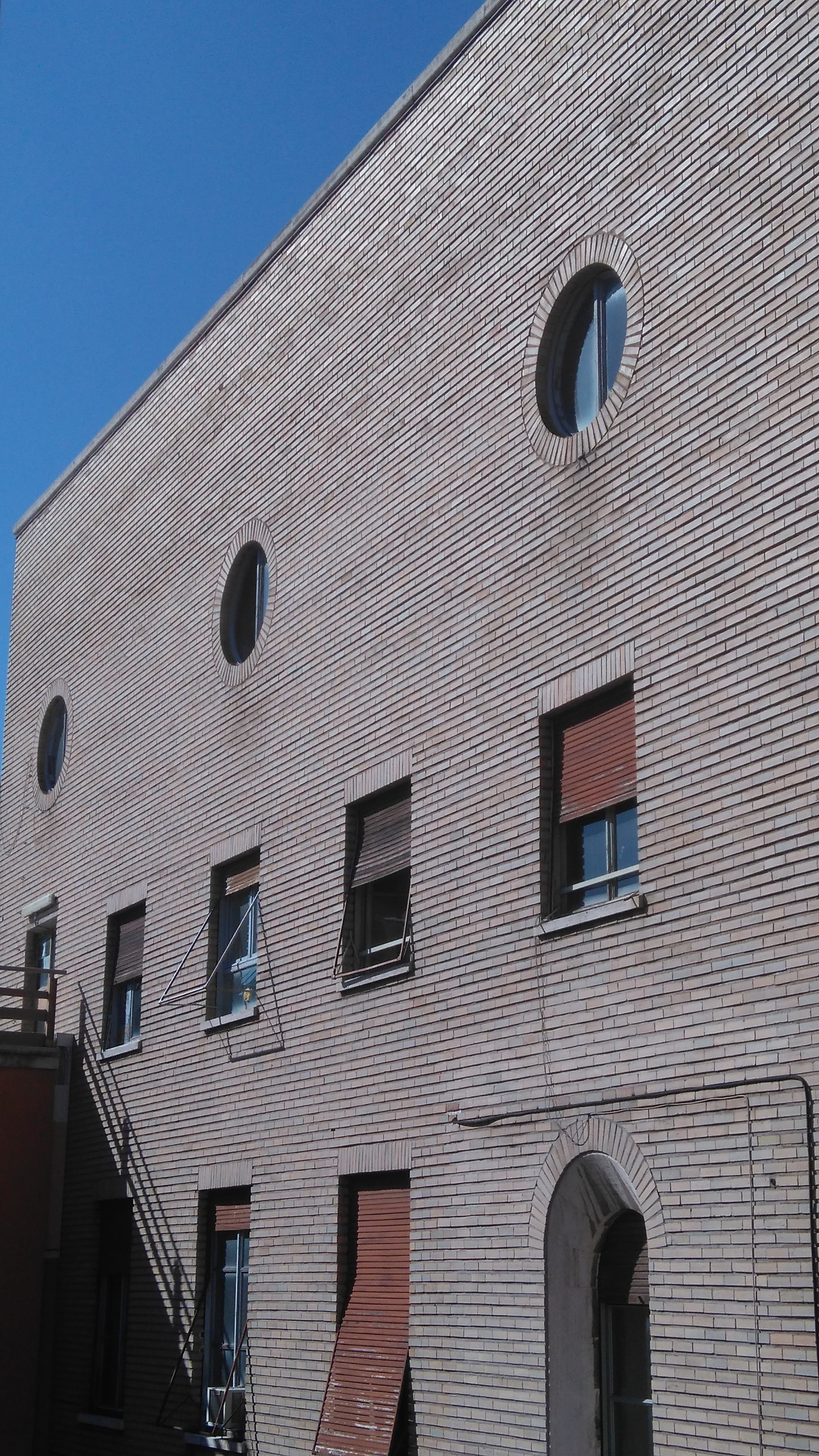 Finestre della biblioteca del dipartimento di matematica "G. Castelnuovo" che affacciano sul cortile interno